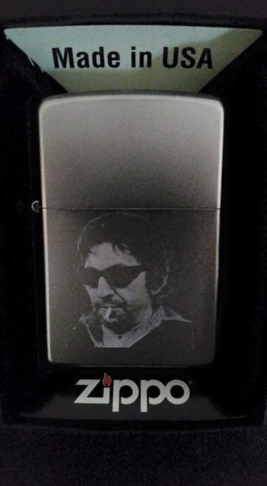 Zippo réalisé par